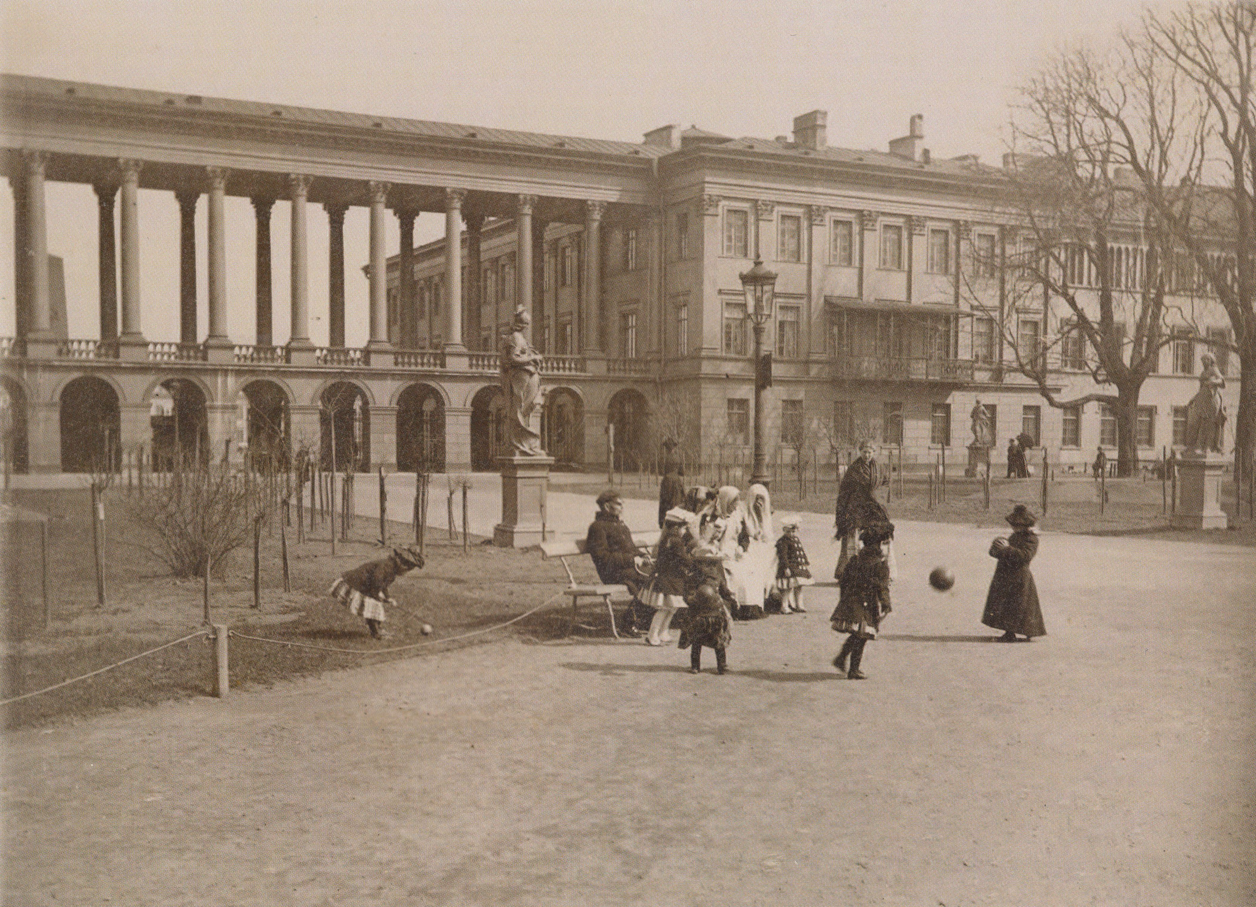 Ogród Saski i Pałac Saski